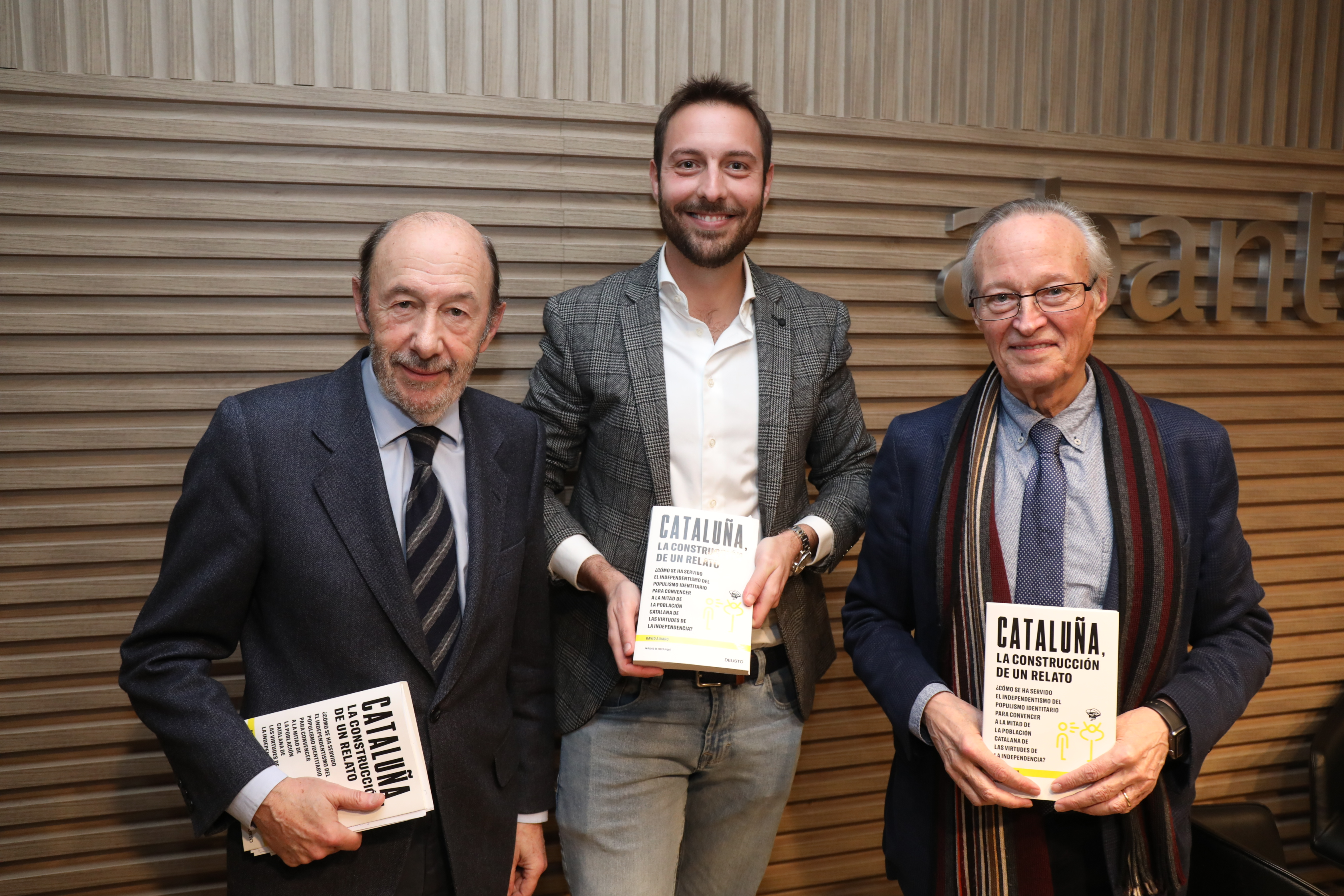 presentación del libro de David Alvaro: " CATALUÑA, La construcción de un relato", en el auditorio Abante (Plaza de la Independencia, 6. Madrid).